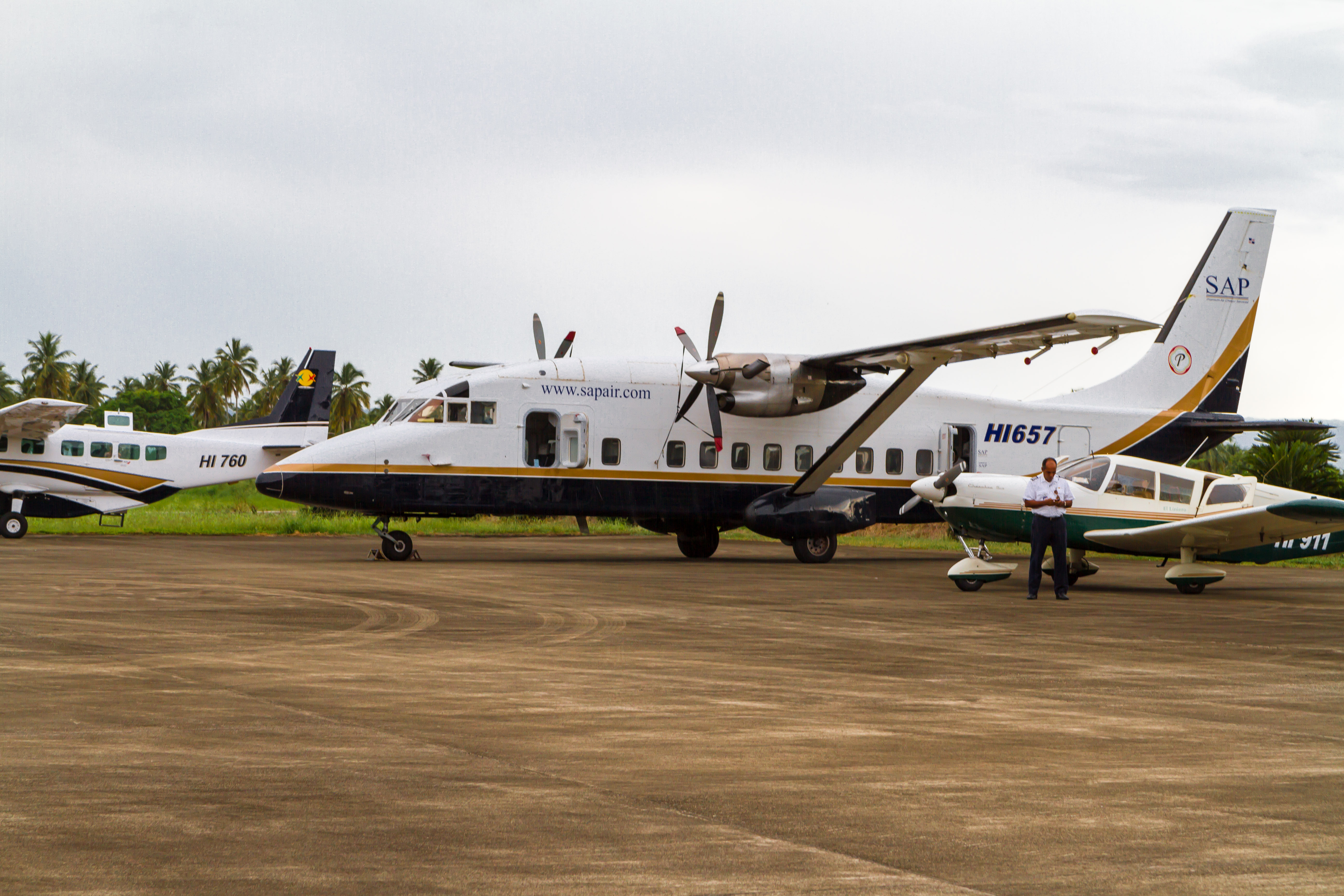 Samaná Province, Dominican Republic